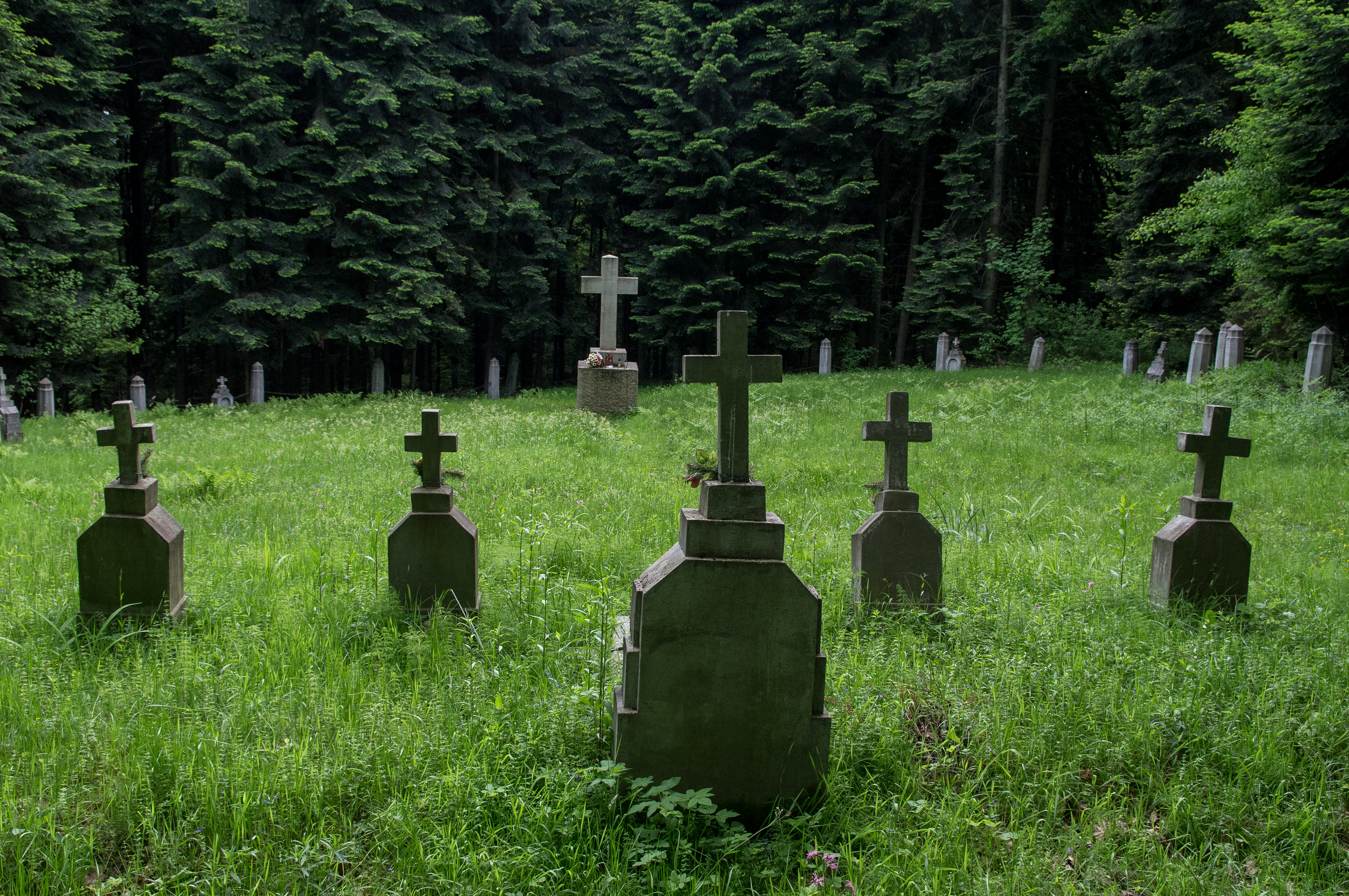 Cmentarz wojenny nr 290 Charzewice